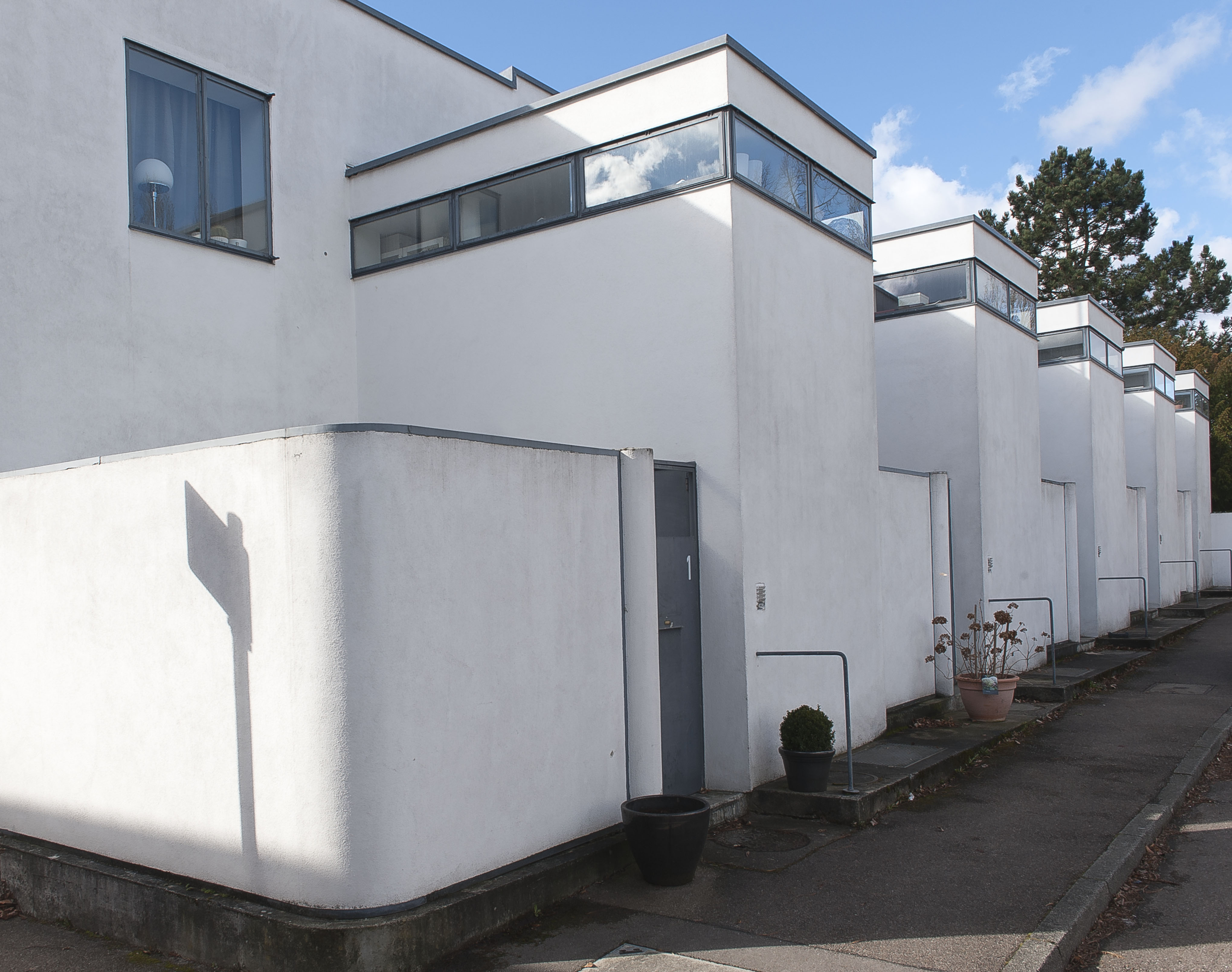 Weißenhofsiedlung, Stuttgart, Häuser von J.J.P. Oud